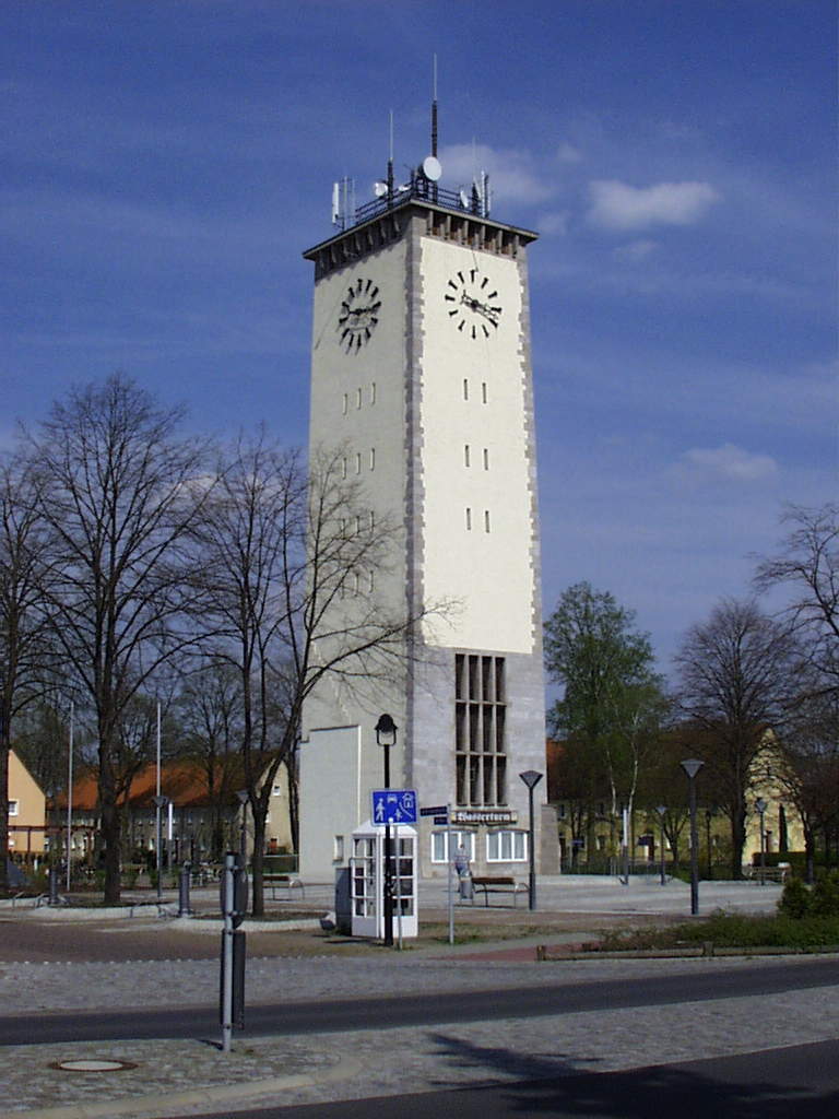 Wasserturm von Schwarzheide, Deutschland.